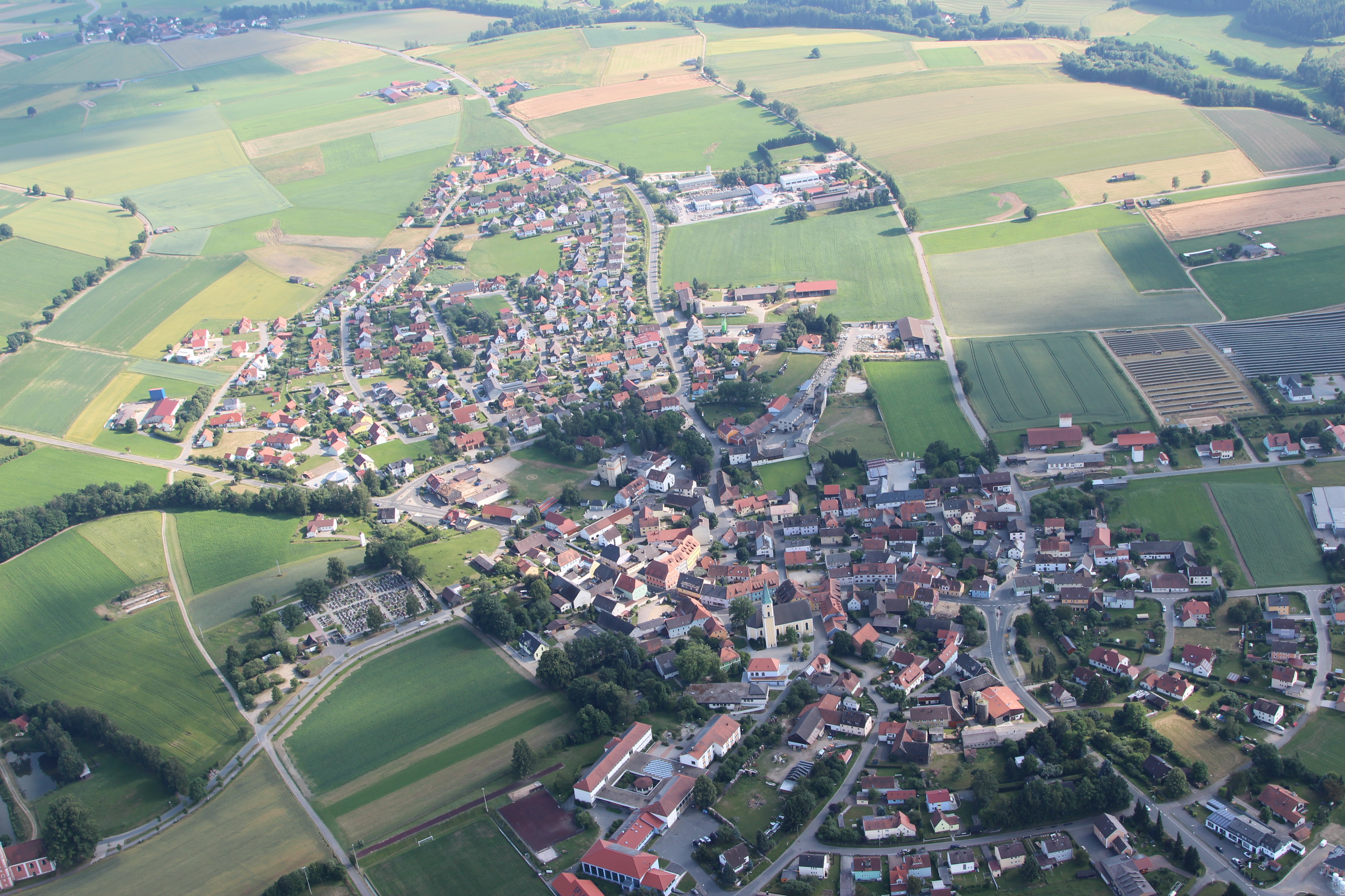 Moosbach, Landkreis Neustadt an der Waldnaab, Oberpfalz, Bayern (2013)